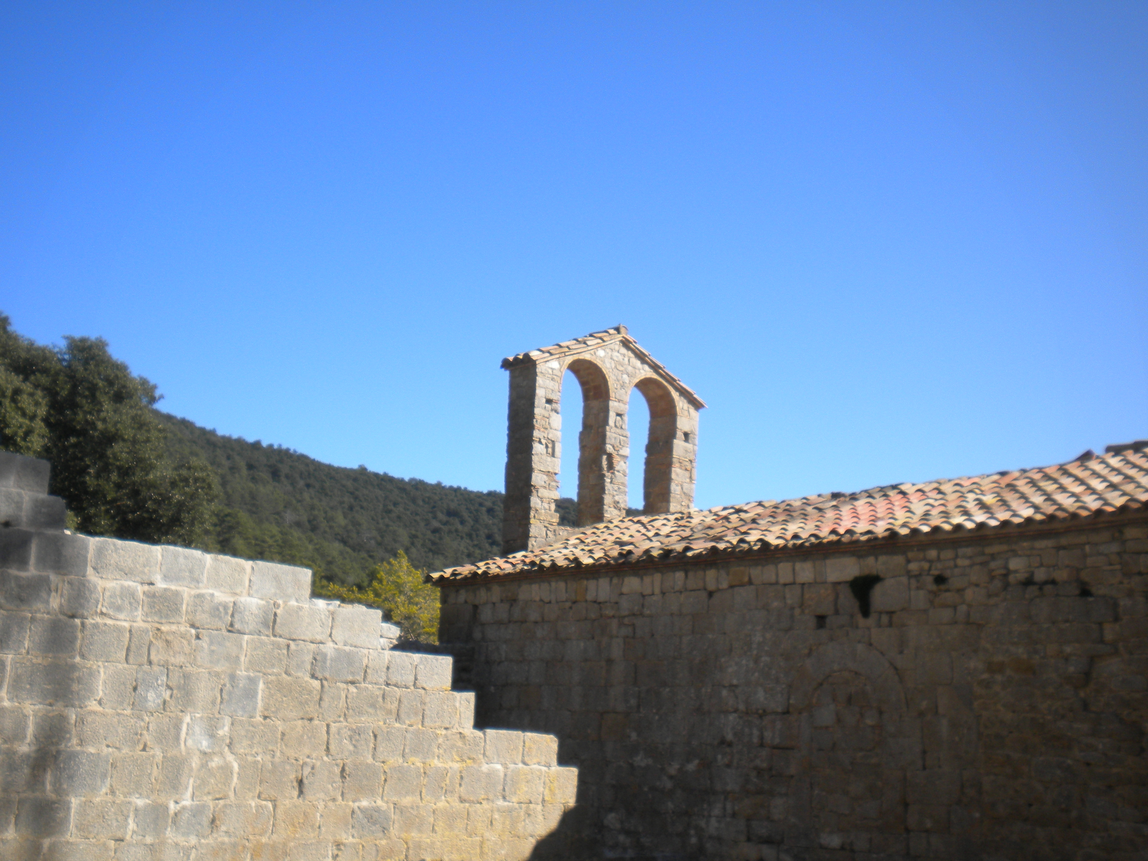 Campanar de cadireta de l'antiga església de Sant Llorenç de Sous, al municipi d'Albanyà, a l'Alta Garrotxa.